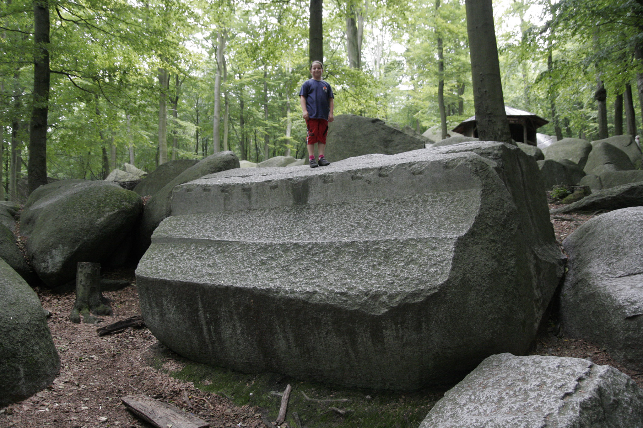 Der Altarstein im Felsenmeer bei Lautertal (Odenwald) Ortsteil Reichenbach